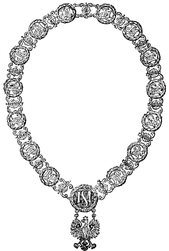 Łańcuch sędziego w czasie rozpraw w ramach Inwalidzkiego Sądu Administracyjnego (II RP)